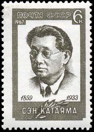 Сэн Катаяма (1859-1933). Япония. Художник: С. Поманский. Марка СССР, номинал - 6коп.